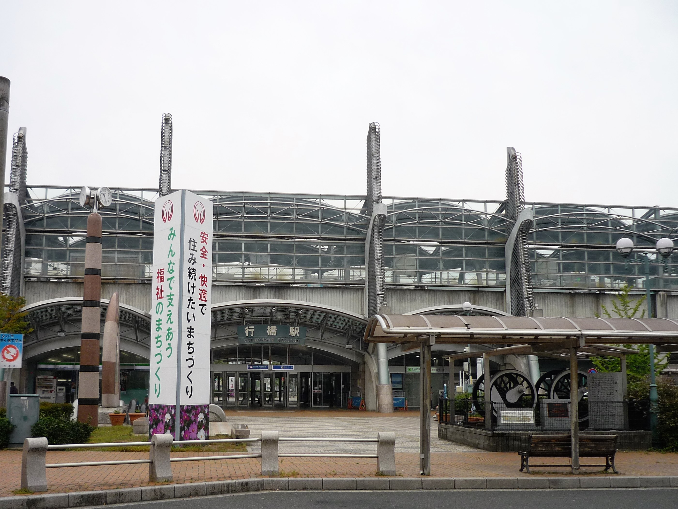 行橋駅東口駅舎（2017年9月） Panasonic Lumix DMC-FS3